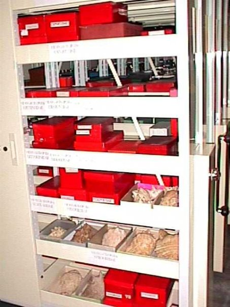 Mobiliario y colección de de moluscos del Museo de Biología de la Universidad Central de Venezuela (MBUCV) hacia 2004 localizada en el Instituto de Zoología Tropical - Universidad Central de Venezuela - Caracas – Venezuela